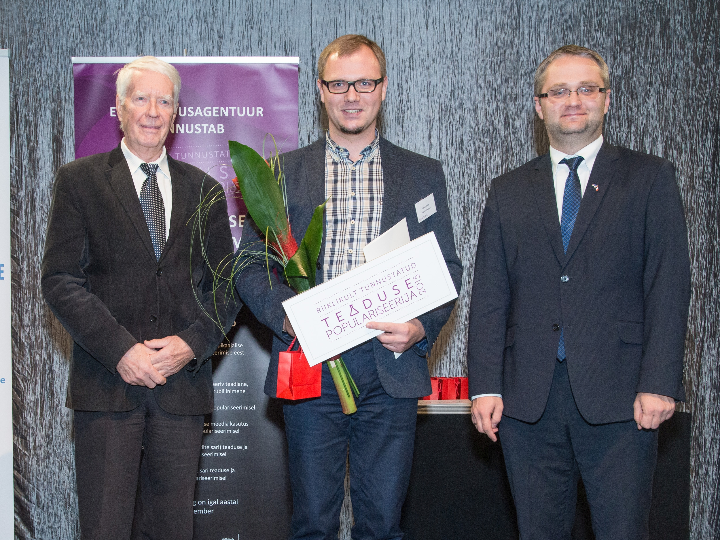 Riiklikult tunnustatud teaduse populariseerija märgi üleandmine Horisondi peatoimetajale Ulvar Käärtile (keskel). Vasakul on hindamiskomisjoni esimees, akadeemik Enn Tõugu. Paremal Haridus- ja teadusministeeriumi kantsler Janar Holm.